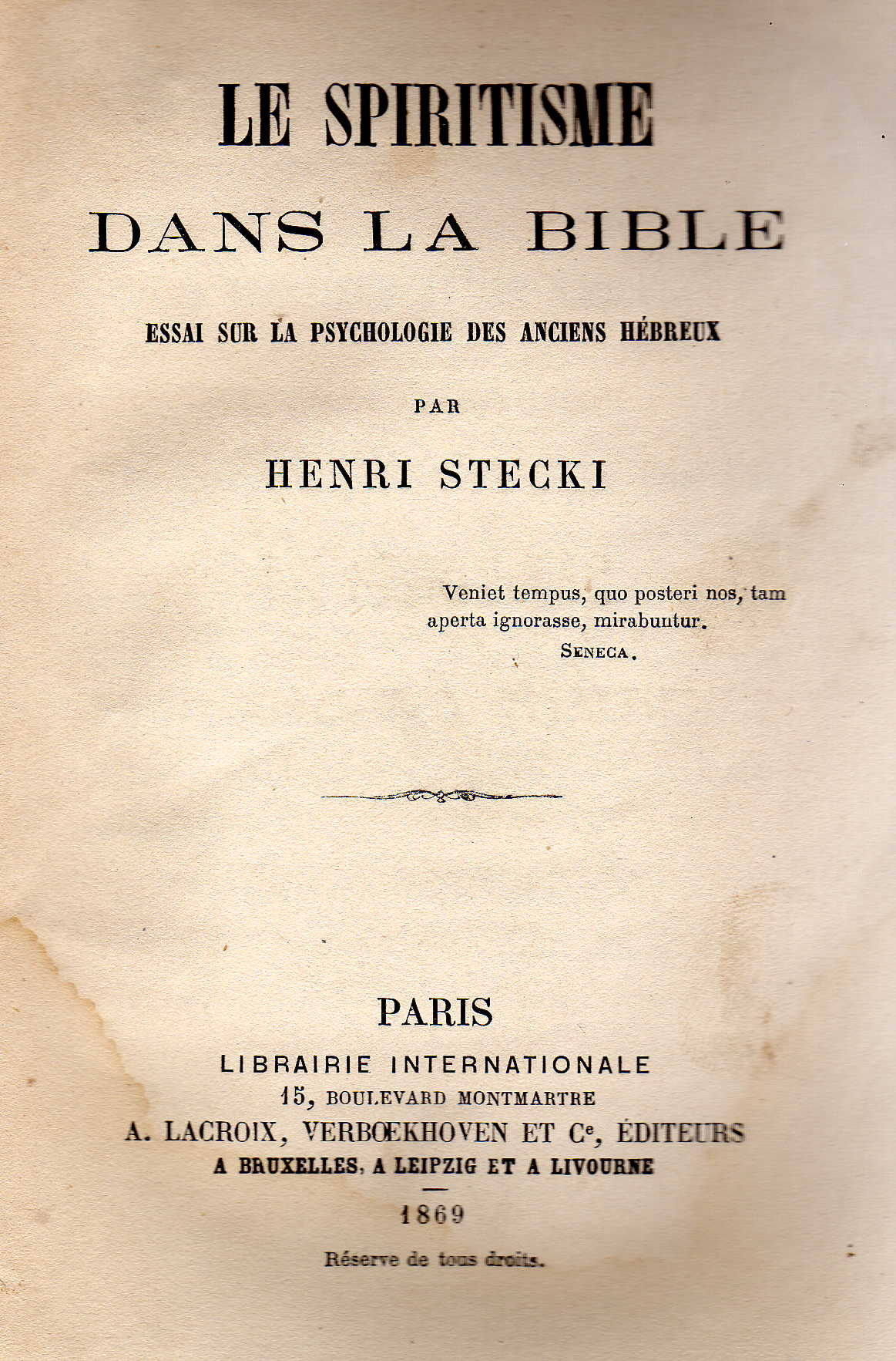 Page de garde du livre : Le spiritisme dans la Bible. Edition de 1869.